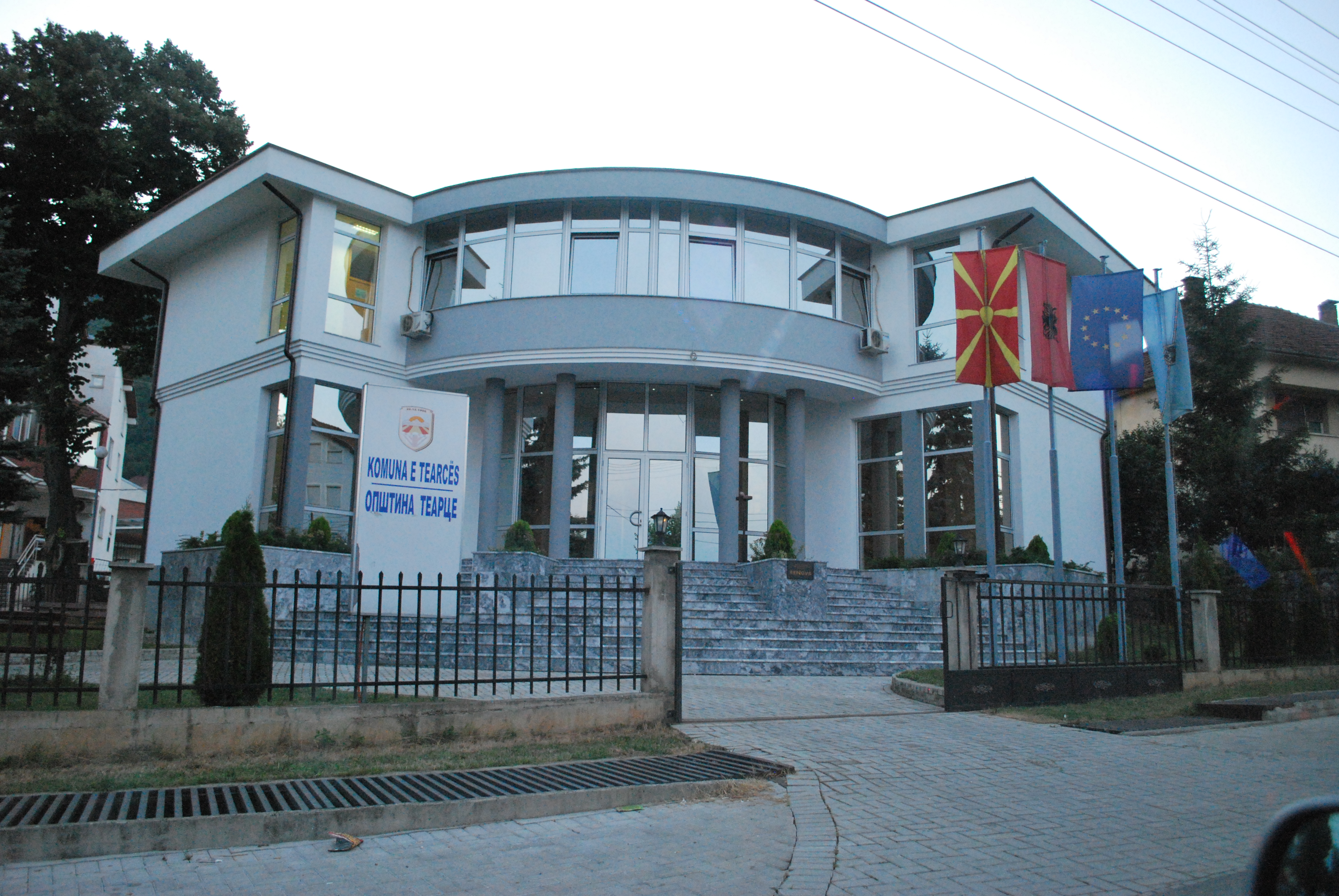 Општинската зграда во Теарце